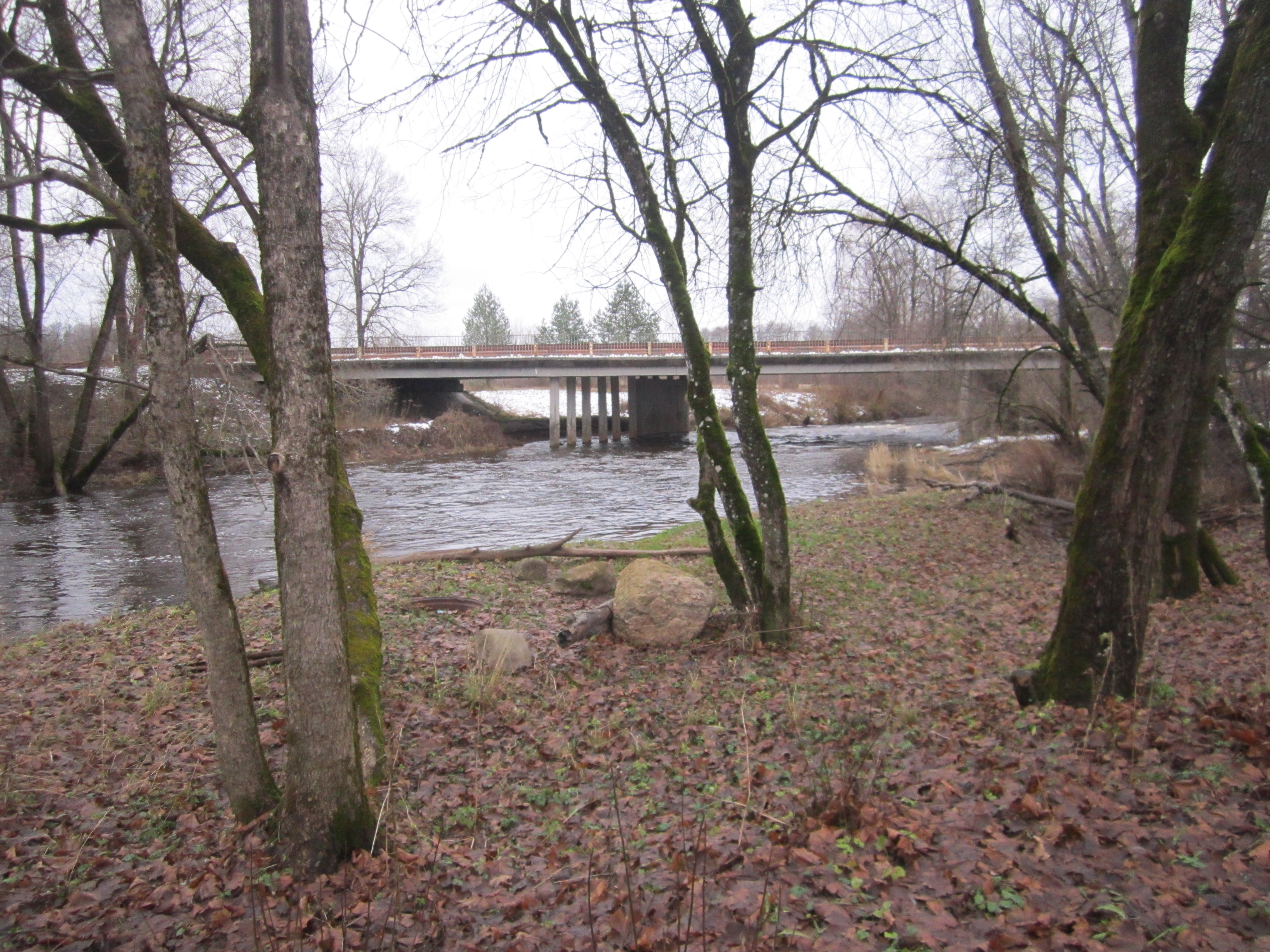 Rīgas -Ērgļu tilts pār Mazās Juglas upi Juglas ciemā